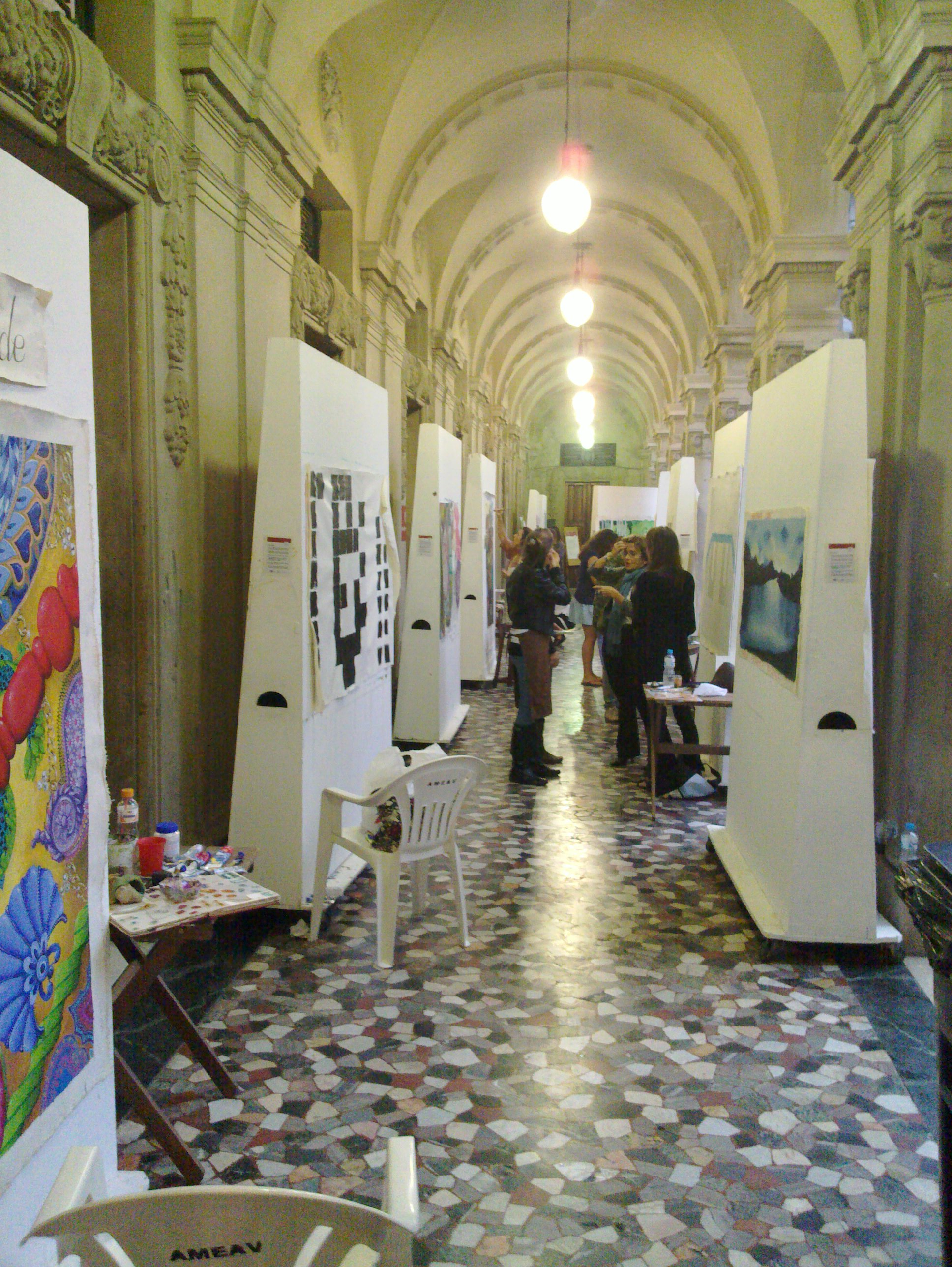 Fotografado durante o Seminário Museus e Cidades Criativas